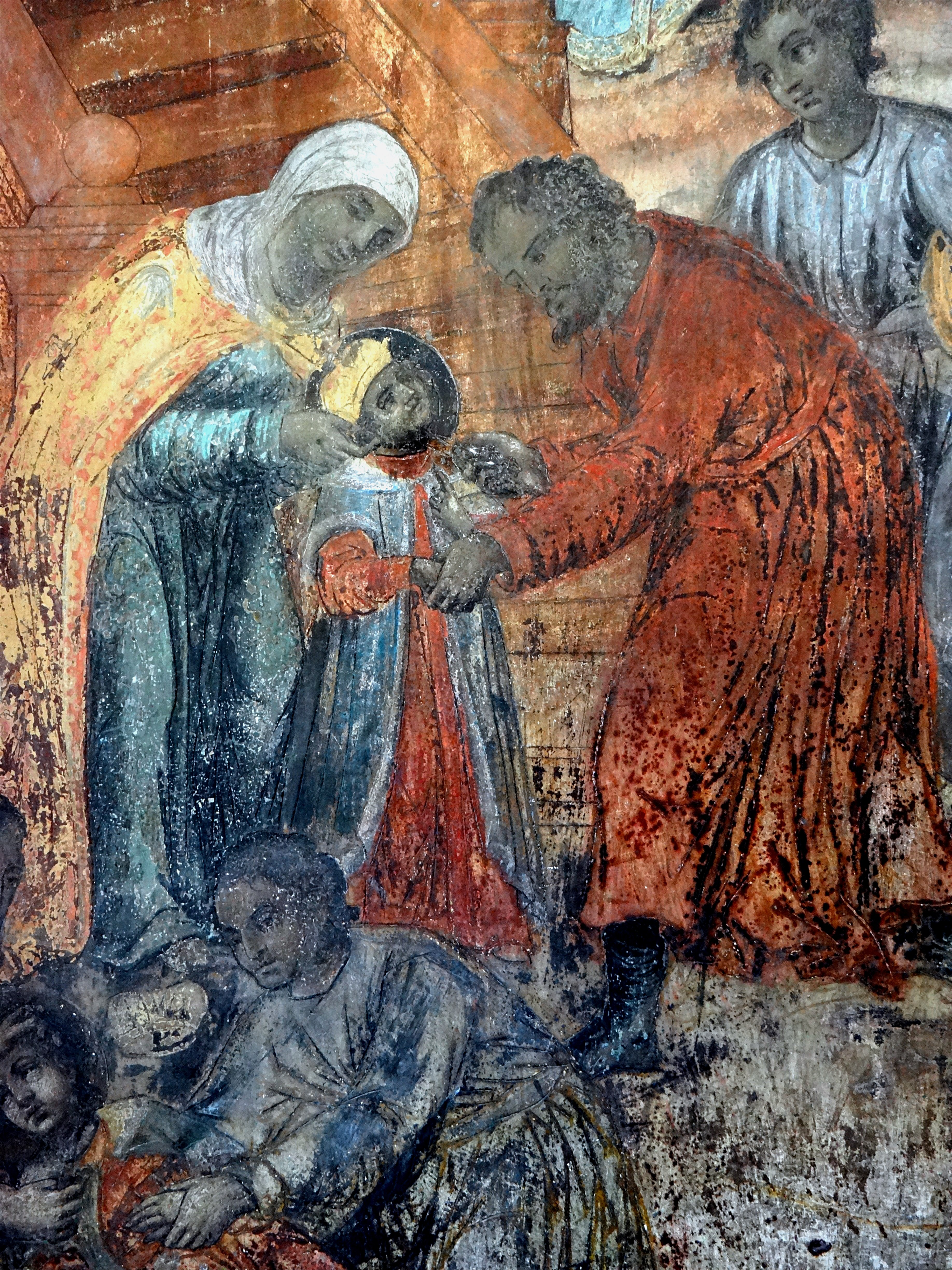 Peinture murale représentant l'assassinat du tsarévitch Dimitri Ivanovitch, église Prince-Dimitri-sur-le-Sang-Versé, Ouglitch, Oblast de Iaroslavl, Russie.